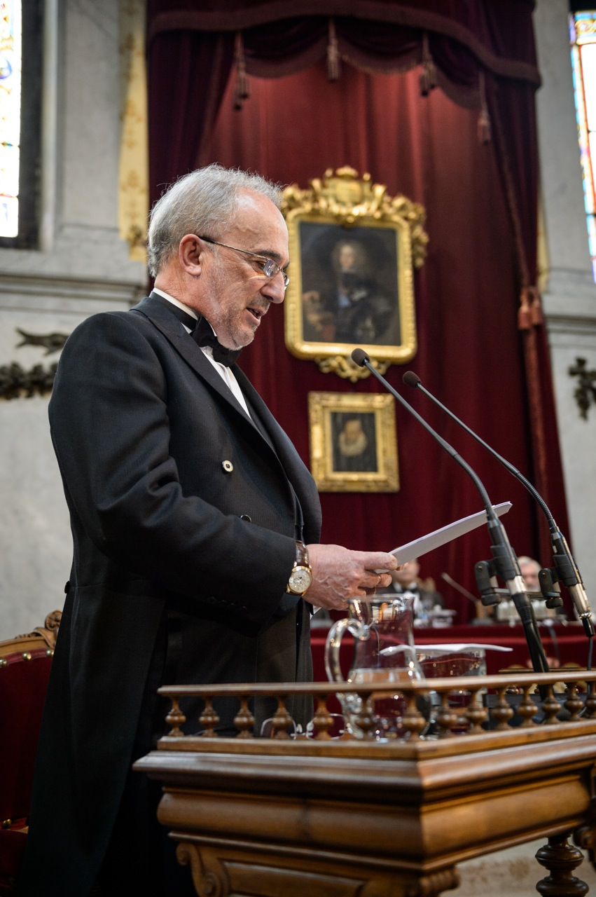 Santiago Muñoz Machado lee su discurso de ingreso en la RAE